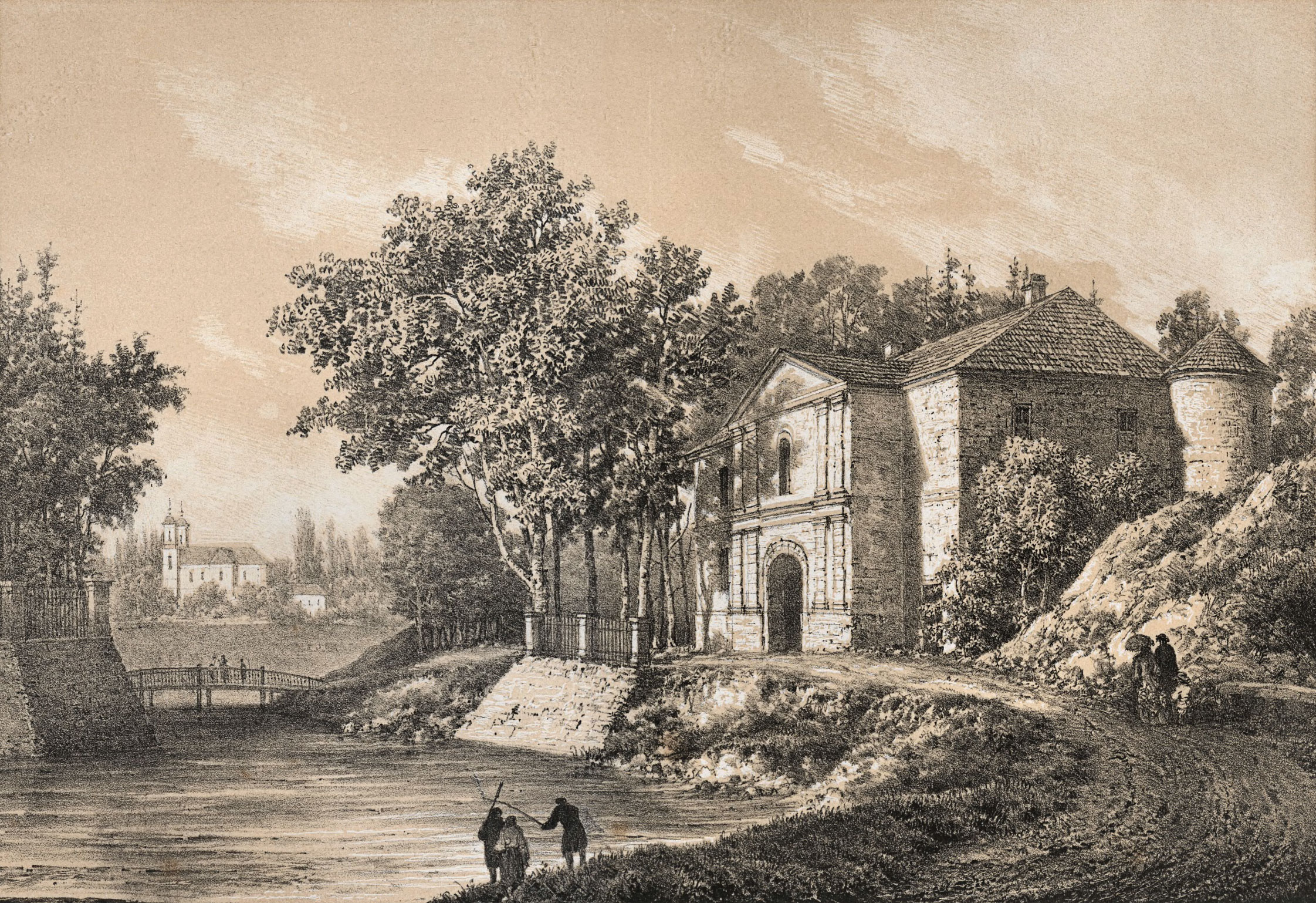 Беларуская (тарашкевіца): Высокае (Vysokaje). Замкавая брама